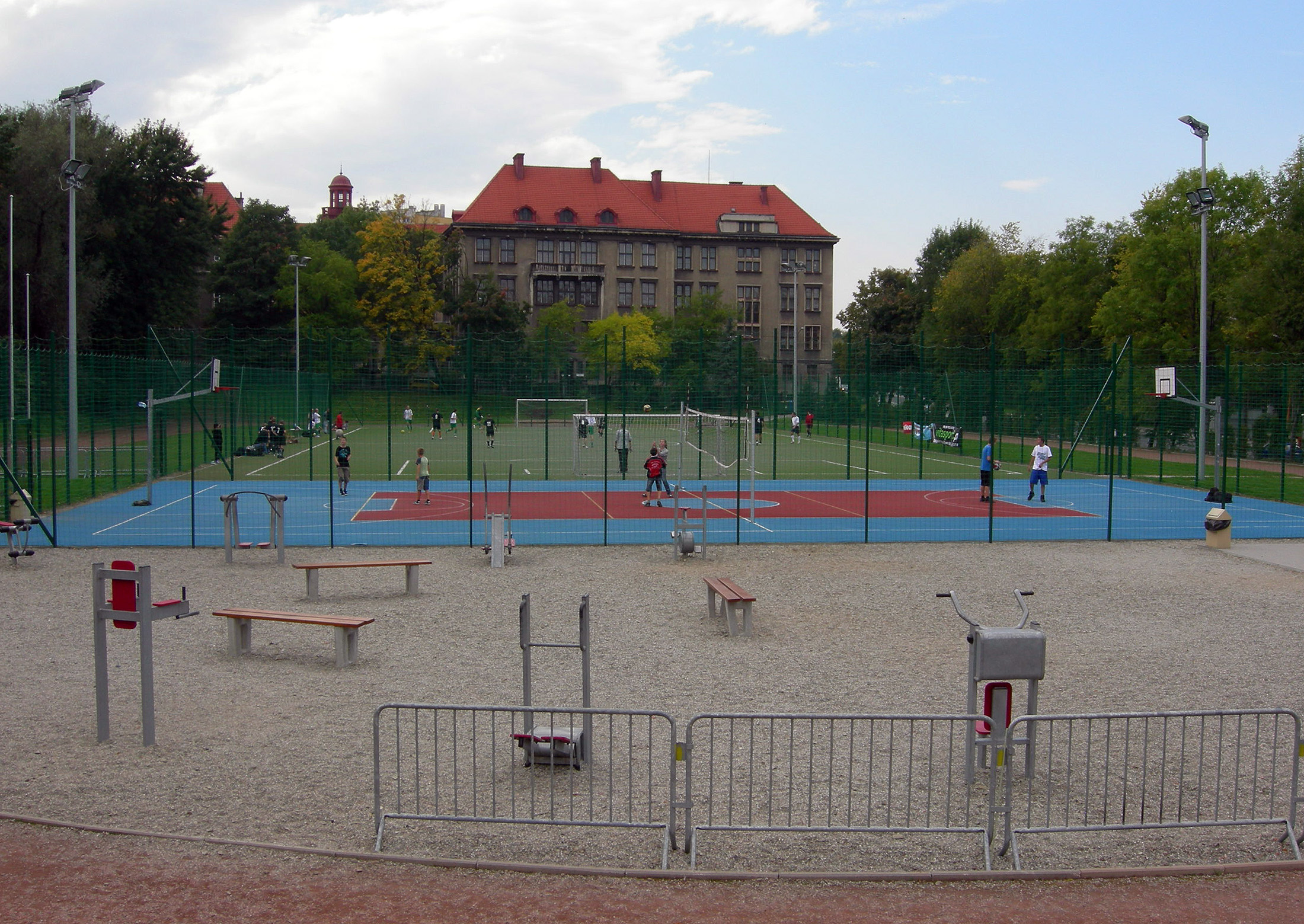 Kompleks sportowy Orlik przy ul. Piastowskiej w Bielsku-Białej – w tle gmach I Liceum Ogólnokształcącego im. M. Kopernika.